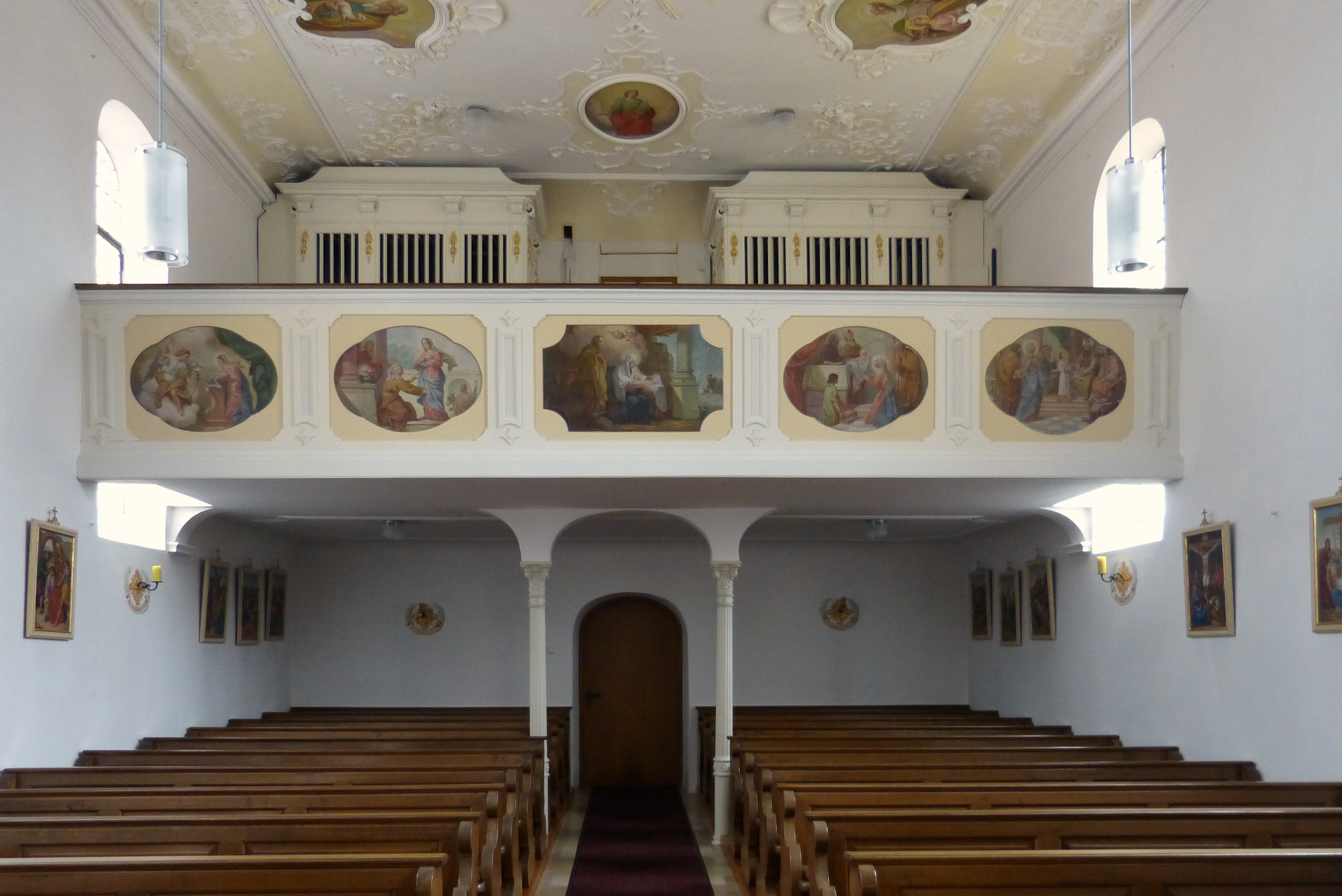 Hirblingen, Pfarrkirche St. Blasius, Empore mit Orgel. This is a photograph of an architectural monument.